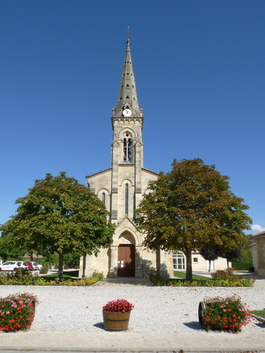 Eglise de Blaignan, Gironde, France